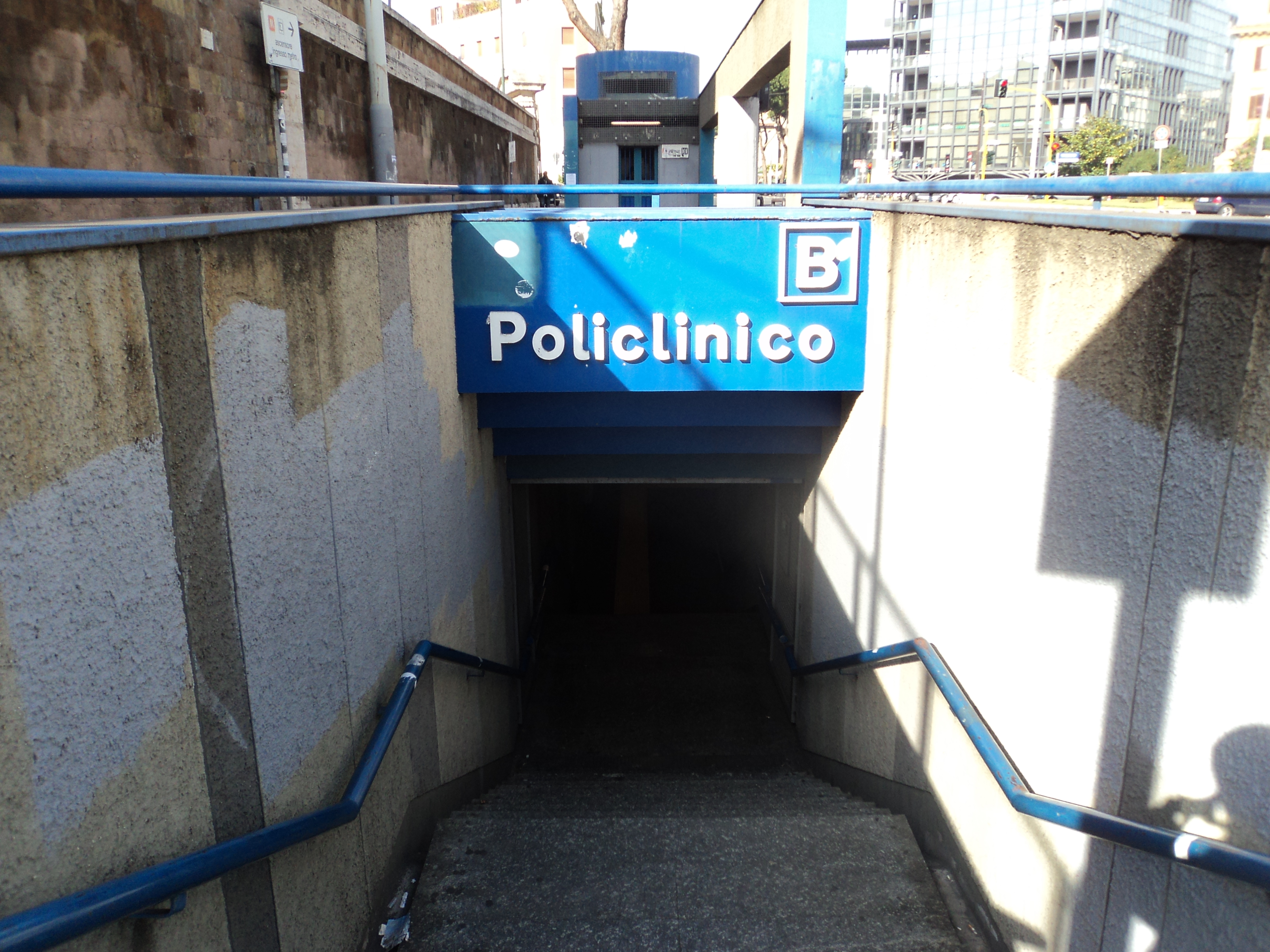 Entrata stazione Policlinico